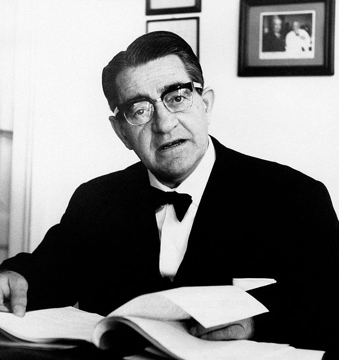 Carlo Arnaudi in Milan